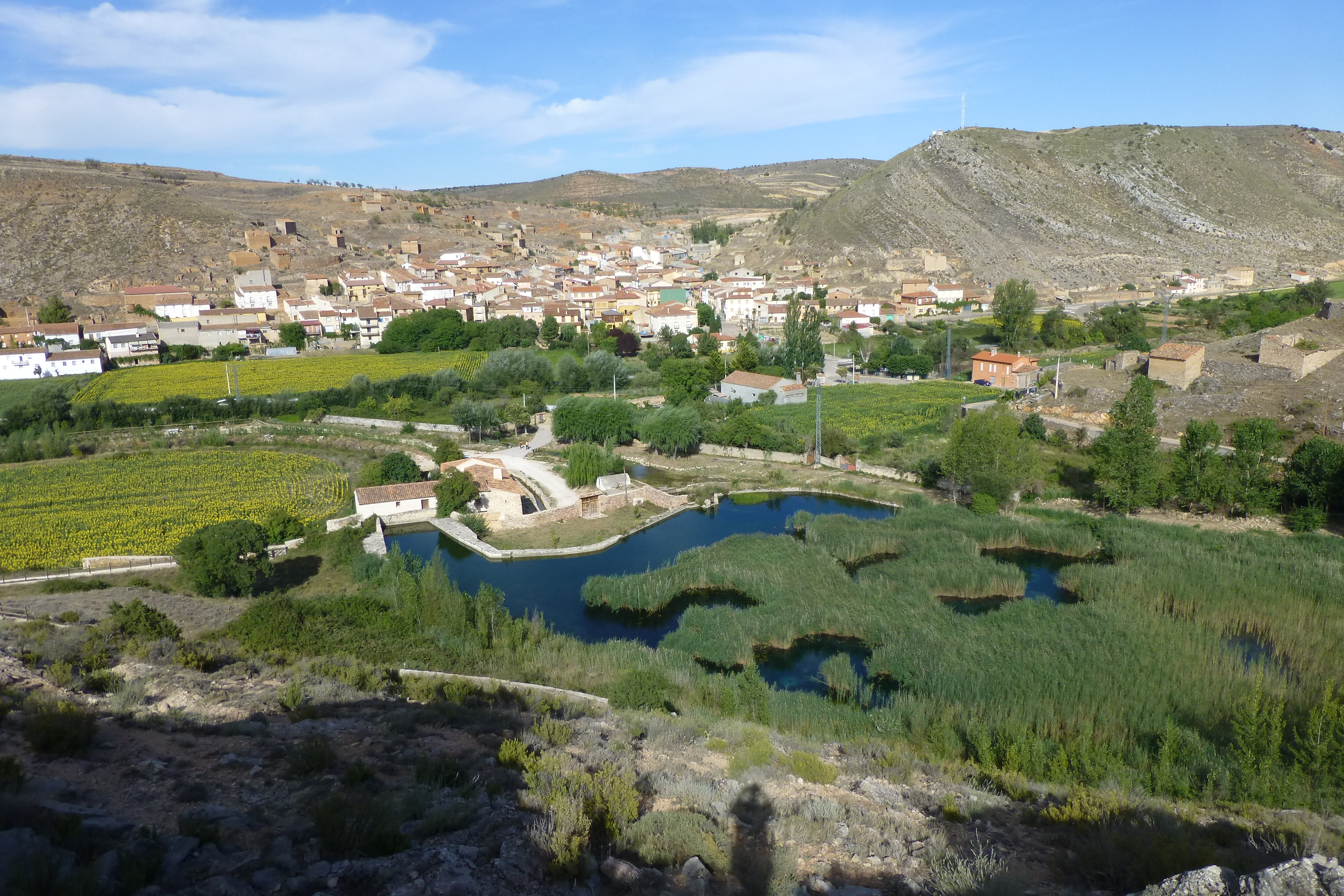 Ojos del río Piedra en Cimballa, Zaragoza Aragón (España).